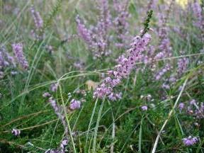 Calluna vulgaris